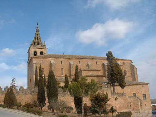 Basílica de Nuestra Señora de la Asunción en Villanueva de la Jara (Cuenca).